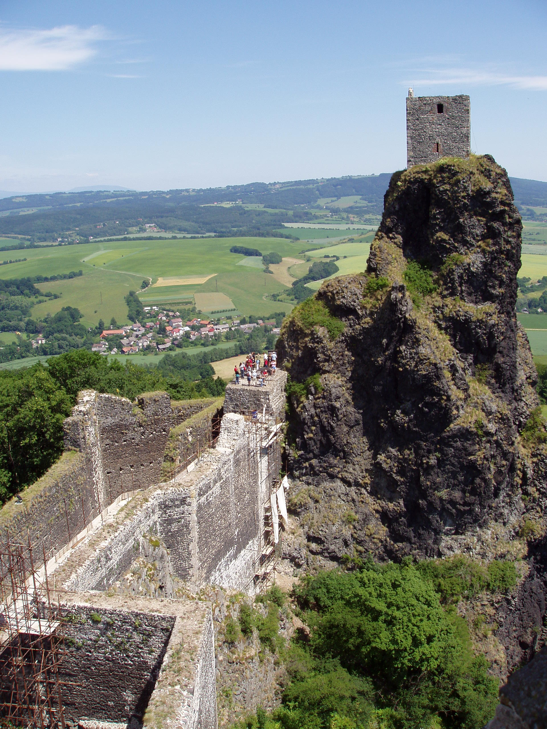 Hrad Trosky, zřícenina (Troskovice), Troskovice